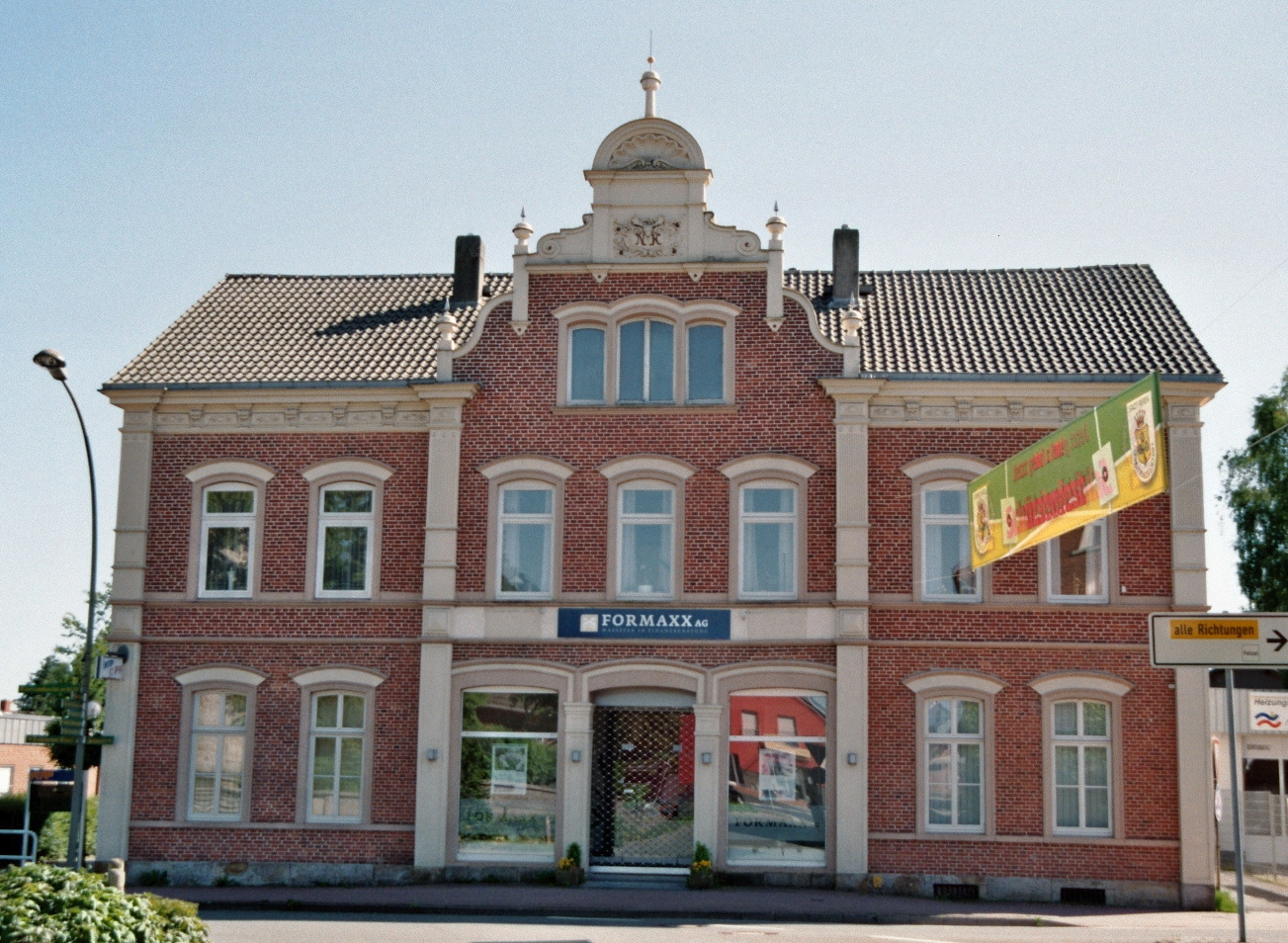 Haus an der Marktstraße in Freren, Landkreis Emsland, Niedersachsen.